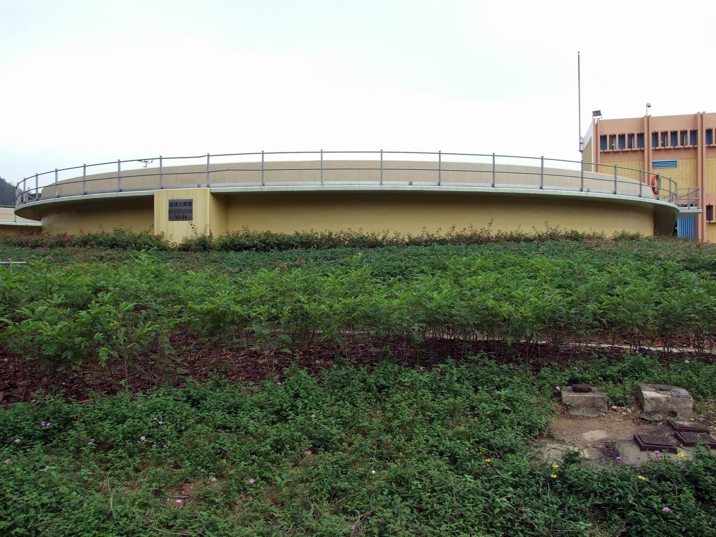 圓形最後沉澱池